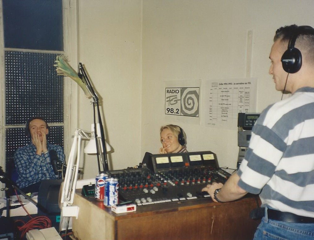 Studio Antenne de Radio FG, 51 rue de Rivoli à Paris (1er) de 1994 à 1995. Emission "FG Matin" présentée par Ludovic et Gwenola, réalisée par Jean-Marc.